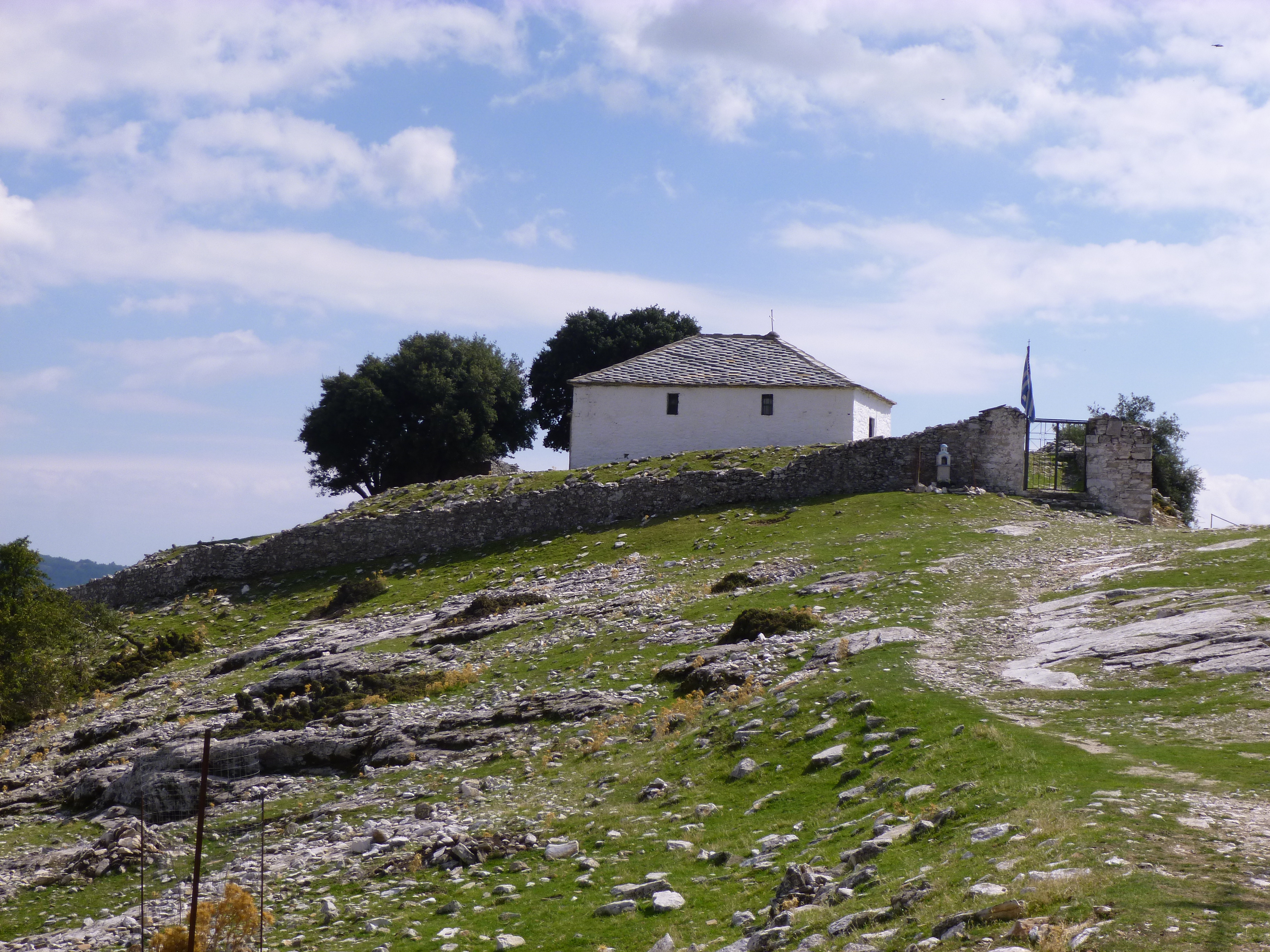 Reste der alten genuesischen Festung im Bergdorf Kastro auf der griechischen Insel Thassos. In der Mitte das Beinhaus (Karner)